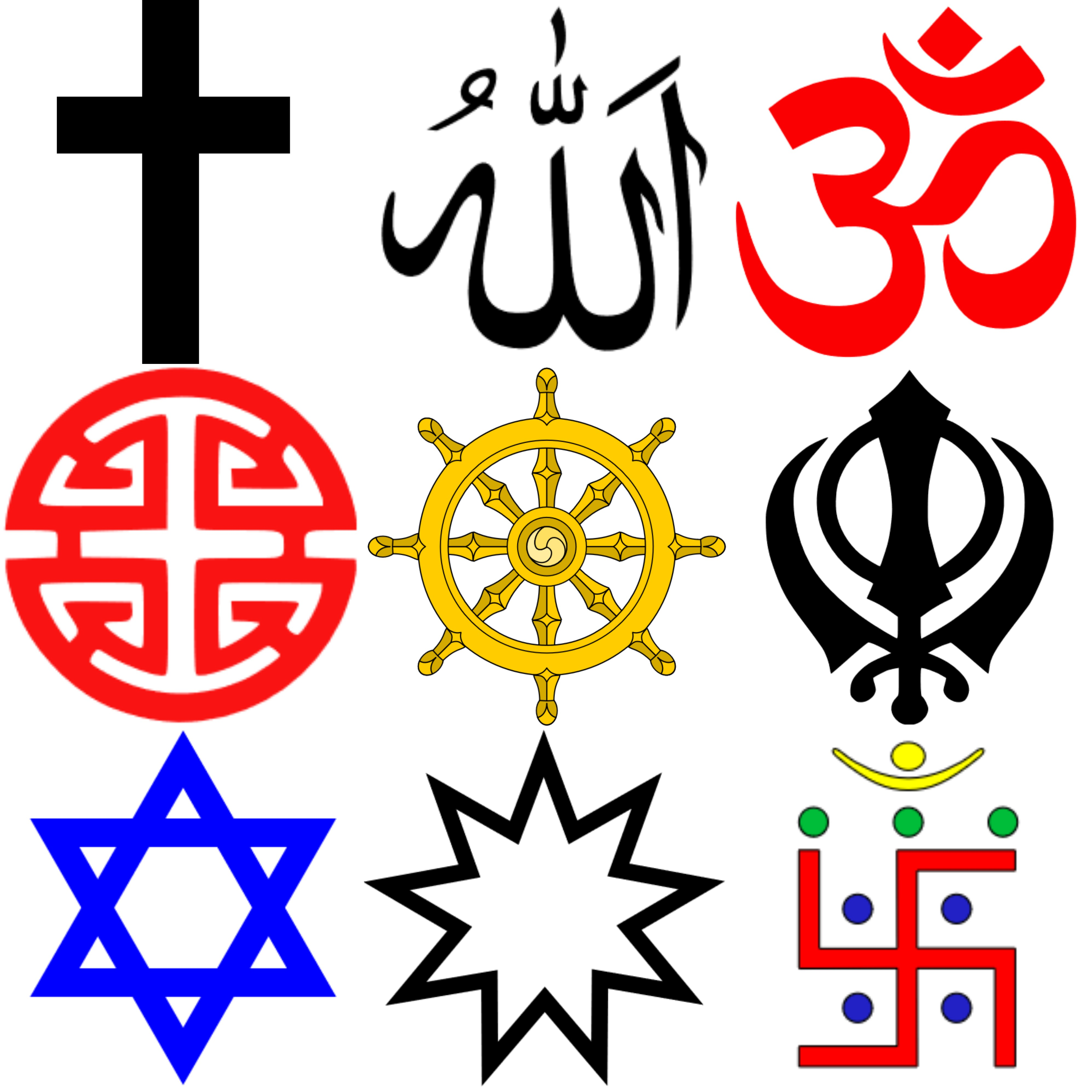 Collage delle 9 religioni con la maggior numero di fedeli secondo le statistiche di